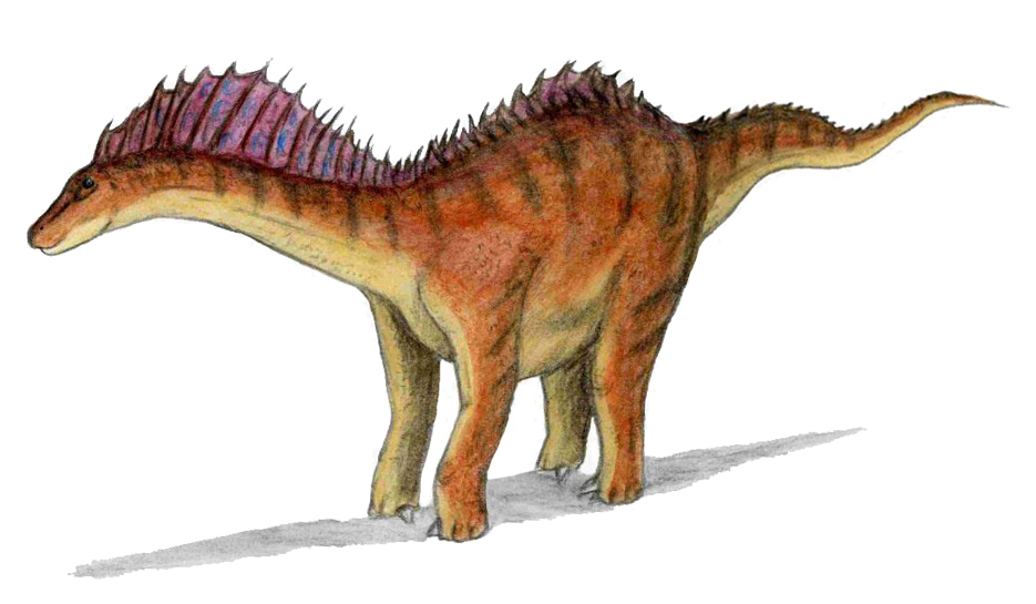 Amargasaurus cazaui Amargasaurus cazaui with speculative skin sail. The proportions are consistent with diagrams by palaeontologists Gregory S. Paul (The Princeton Field Guide to Dinosaurs, 2010, p. 188), sail reflects Bailey, 1997 ("Neural spine elongation in dinosaurs: sailbacks or buffalo-backs?").